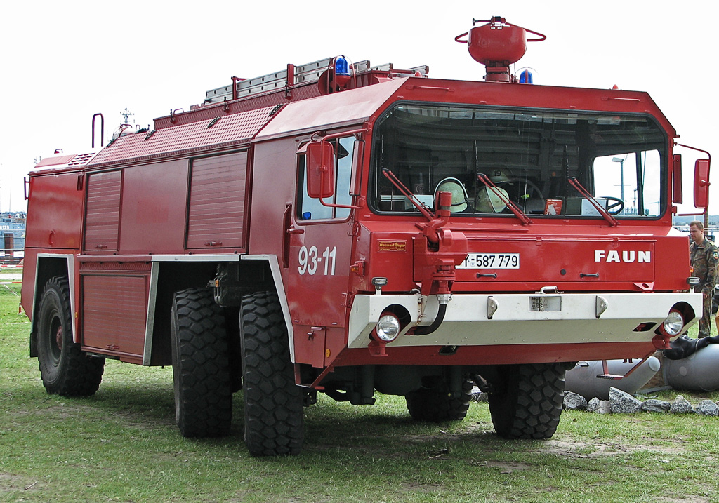 Bundeswehr-Feuerwehr-Großtanklöschfahrzeug Faun GTLF 3500 aka FlKfz 3500 der Bundeswehrfeuerwehr des Marinestützpunktes Hohe Düne (Rostock) Fahrgestell: FAUN LF 22.30/45V 6x4, Aufbau: Arbeitsgemeinschaft Bachert / Ziegler, Baujahr/EZ: 1986.